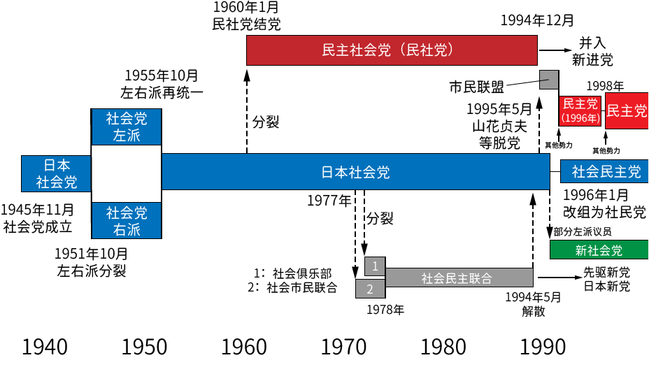 中文（中国大陆）: 日本社会党历史简图（png版本）